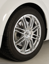 Une jante Targa sur Audi TT au PTS